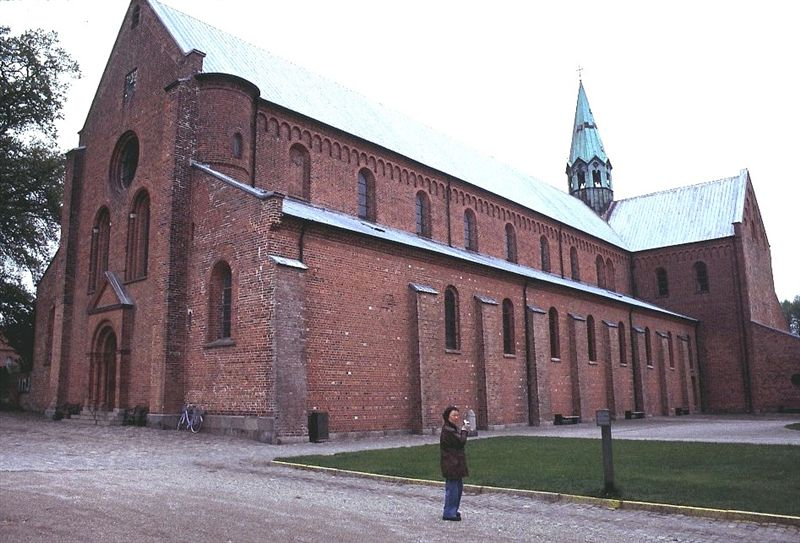 Outside view of Sorø Klosterkirke